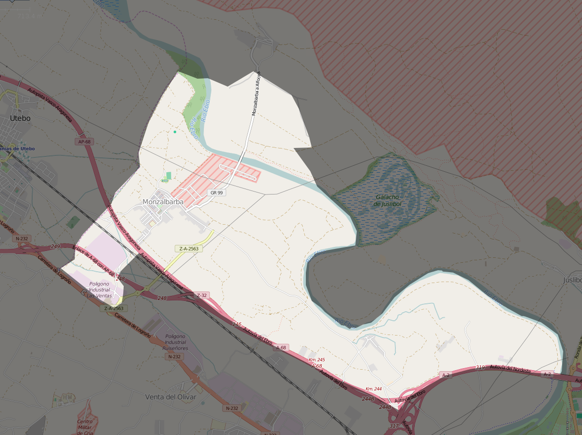 Mapa del distrito de Monzalbarba en Zaragoza.